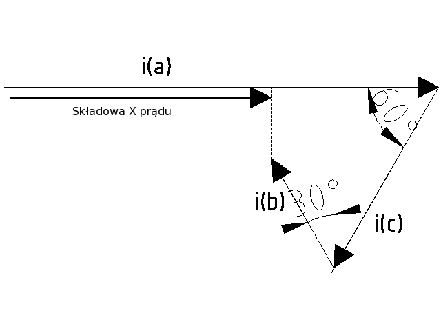 Transformacja Clarke'a Wyliczanie Składowej X